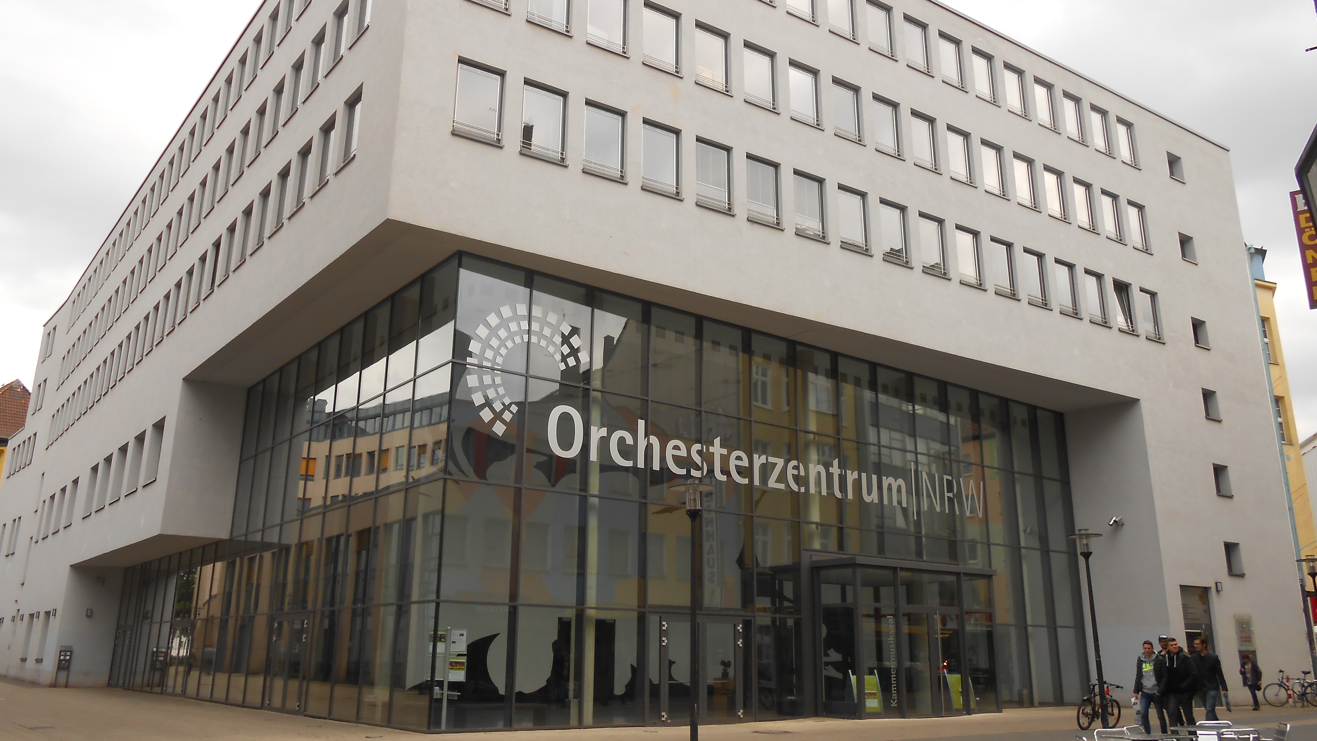 Das Orchesterzentrum NRW in Dortmund, an der Brückstraße.